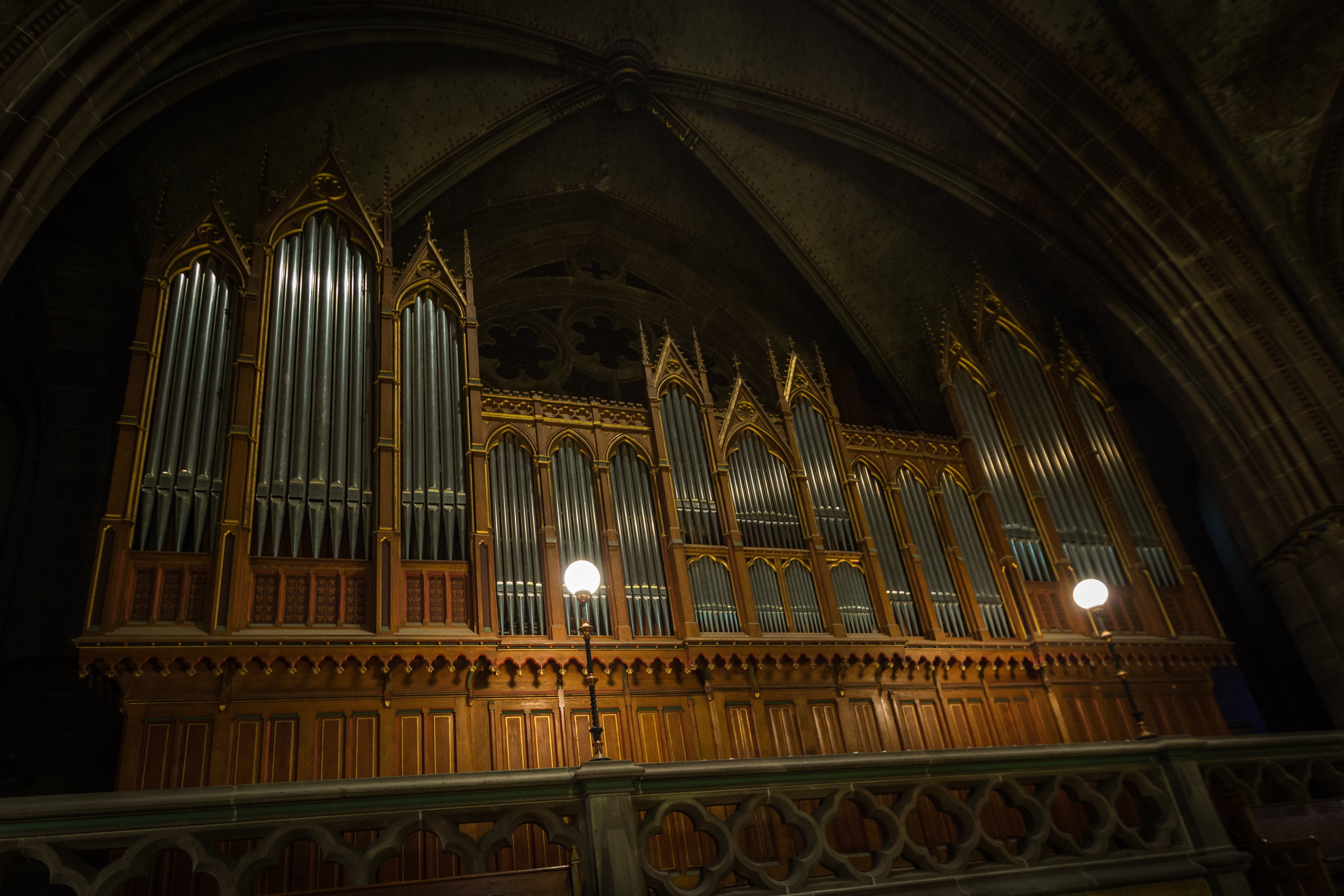 Strasbourg église Saint-Paul, orgue Walcker.